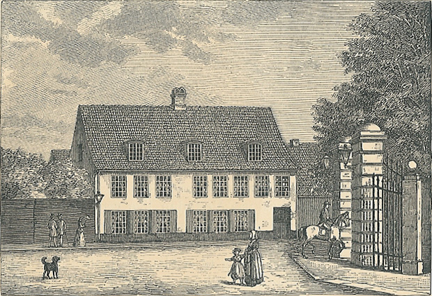 Adam Gottlob Oehlenschlägers fødested på Vesterbro i København. Oehlenschlägers birthplace at Vesterbro in Copenhagen.